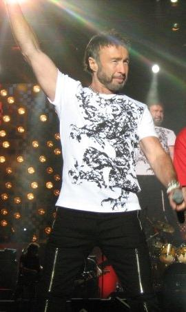 Paul Rodgers en 2008